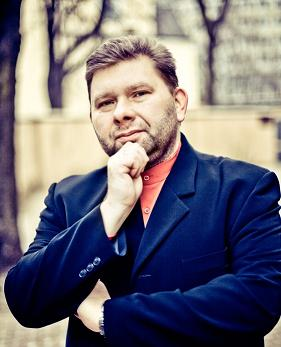 Paweł Łukaszewski, kompozytor i dyrygent.